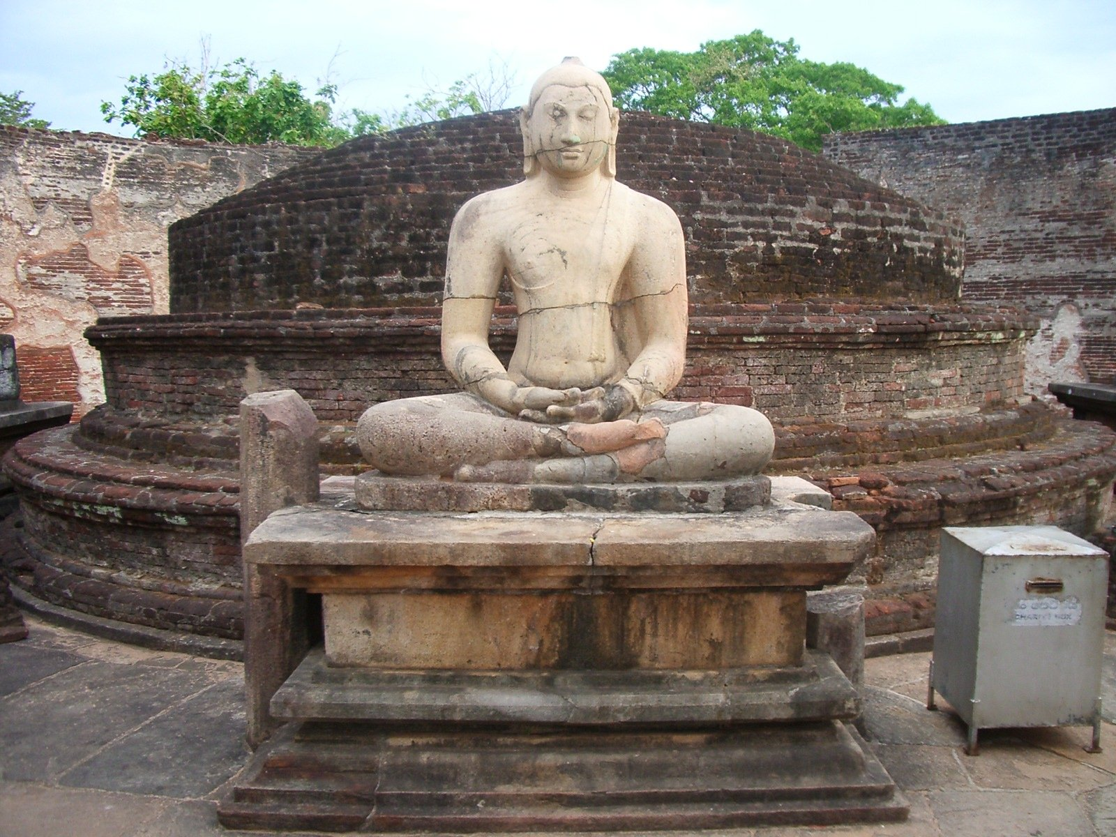 Buda a un temple de Polonnaruwa; foto feta per J. Ollé el juliol del 2006